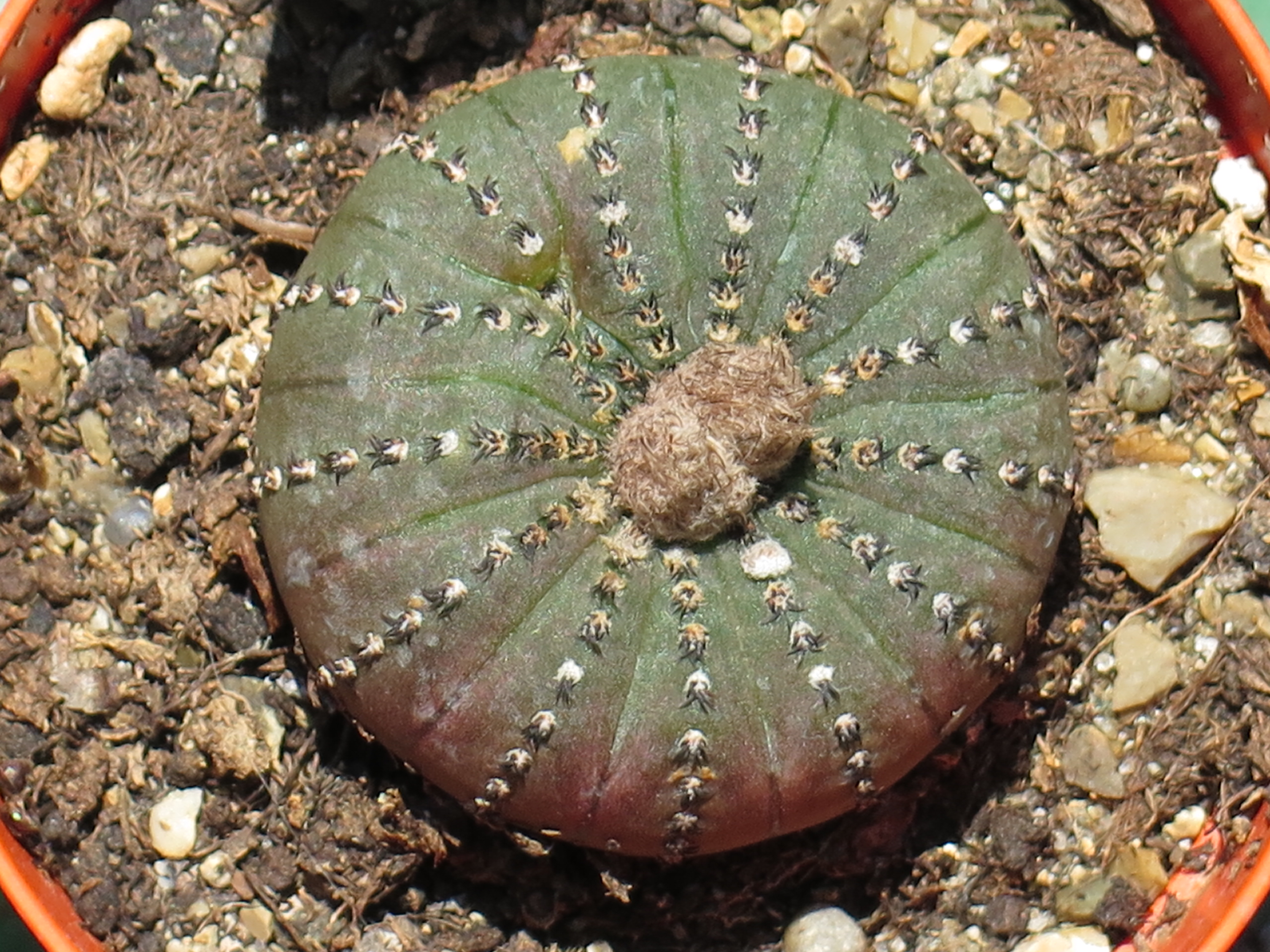 Frailea castanea vista dall'alto